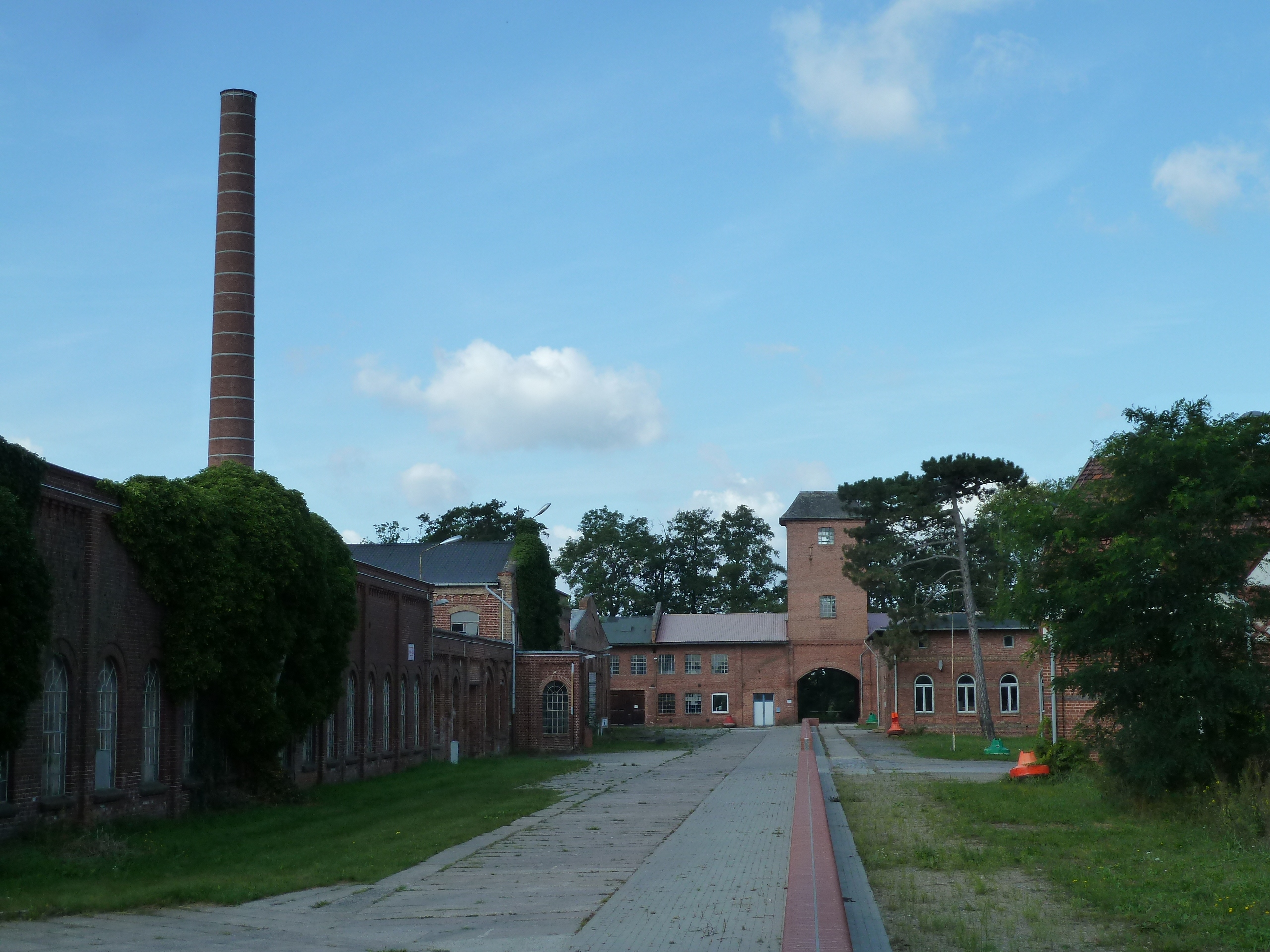 Neu Kaliß, Papierfabrik